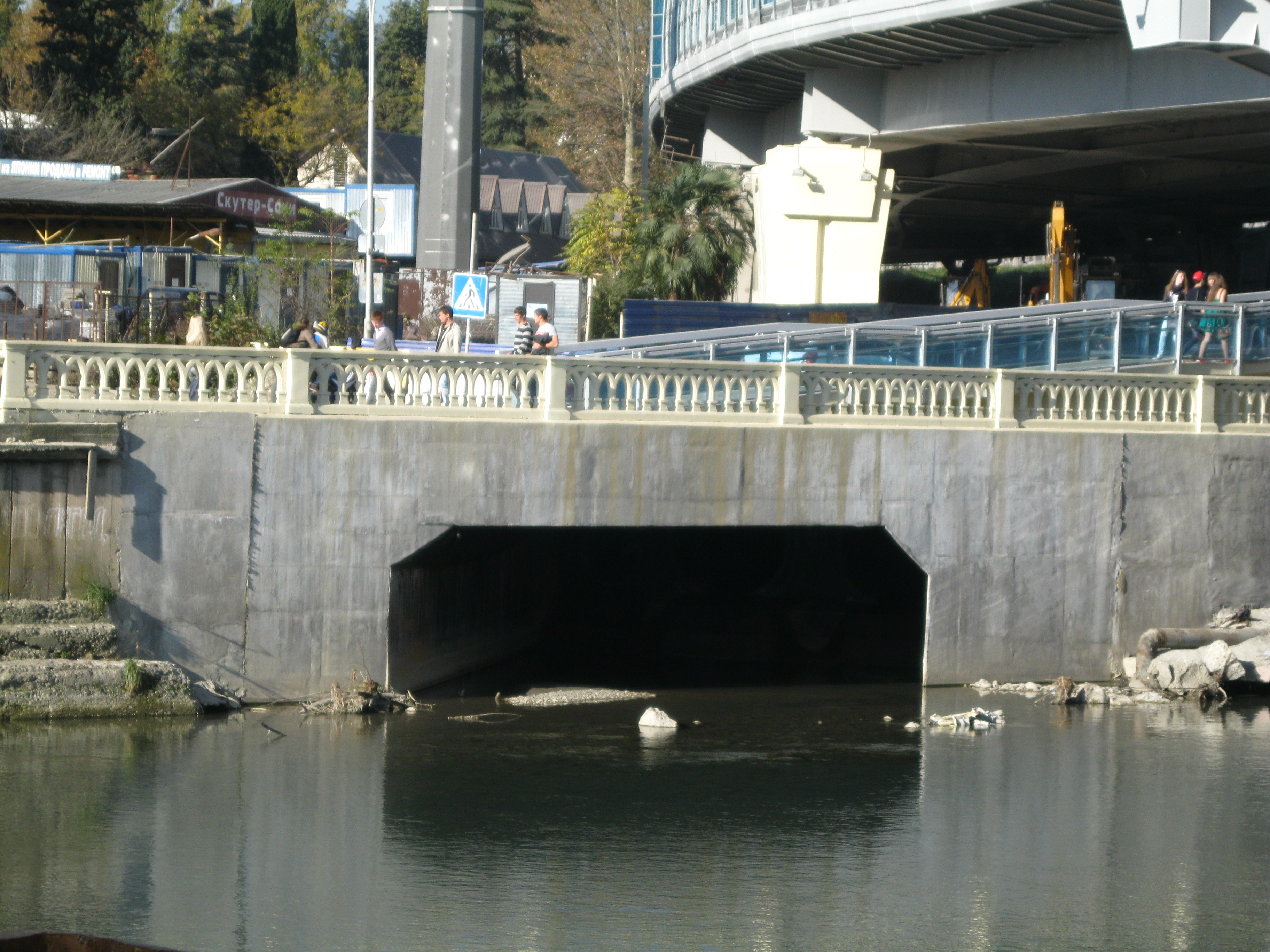 Устье Хлудовского ручья в Сочи